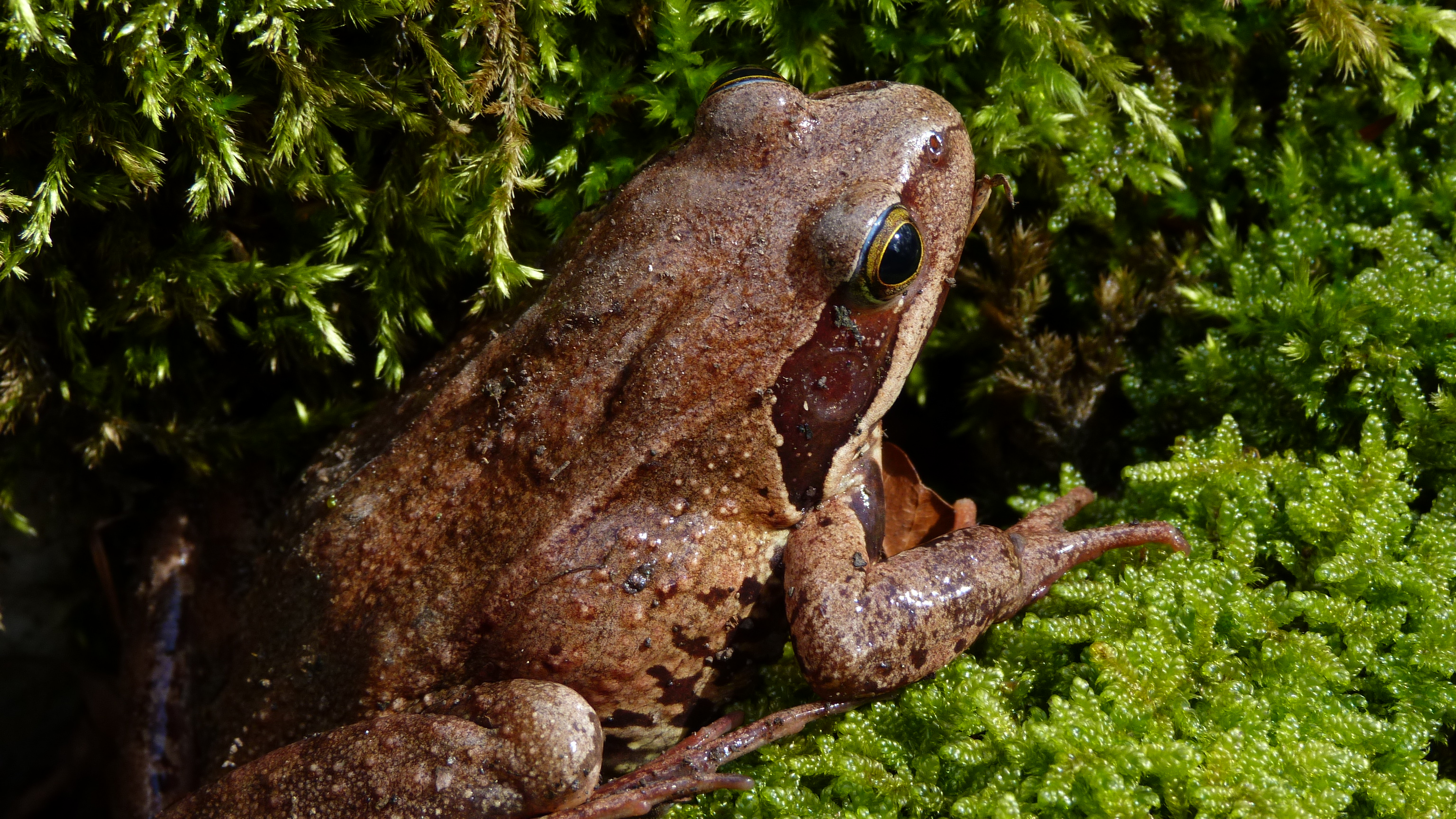 Nafarroako Ireber mendian ikusitako baso-igel gorria, hamarren bat zentimetrokoa.